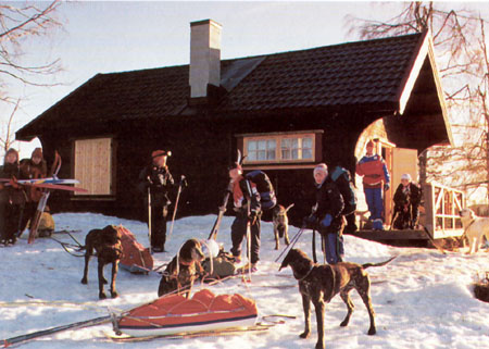 The cottage Askerhytta, it pertains Asker Trekkhundklubb.